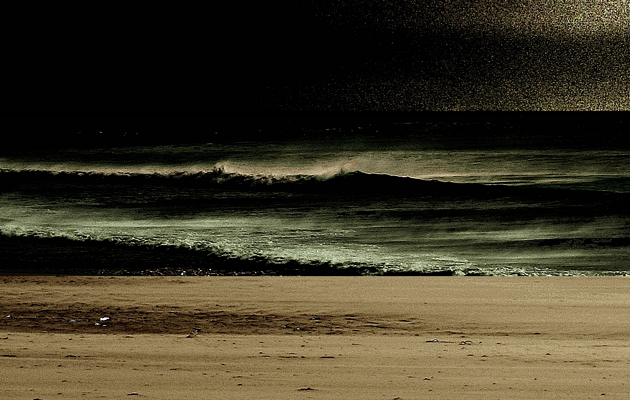 Meeresufer, von Helmut Diez